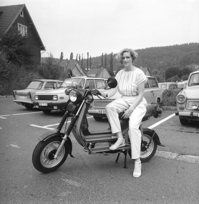 ADN-ZB/Schaar/14.10.85 Suhl: Einen modernen neuen Kleinroller - KR 52/80 die technische Bezeichnung - stellte der VEB Fahrzeug- und Jagdwaffenwerk "Ernst Thälmann" Suhl zur Leipziger Herbstmesse 85 vor. Produziert wird der Simson Roller in einer 2,72 kW(3,7 PS)- und einer 4,1, kW(5,6 PS)-Variante. Bei einem Streckenkraftstoffverbrauch von 2,4 bzw. 2,5 l/100 km wird eine Höchstgeschwindigkeit von 60 bzw. 70 km/h angegeben.